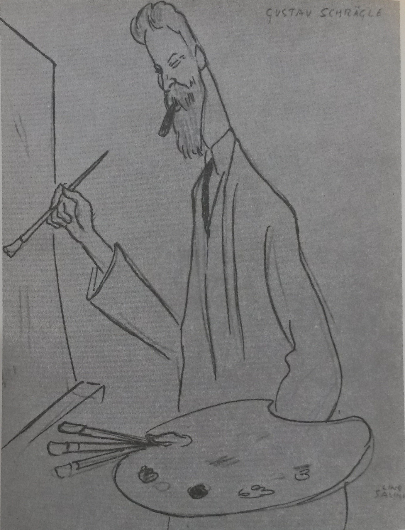 Darstellung von Gustav Schraegle durch Lino Salini.